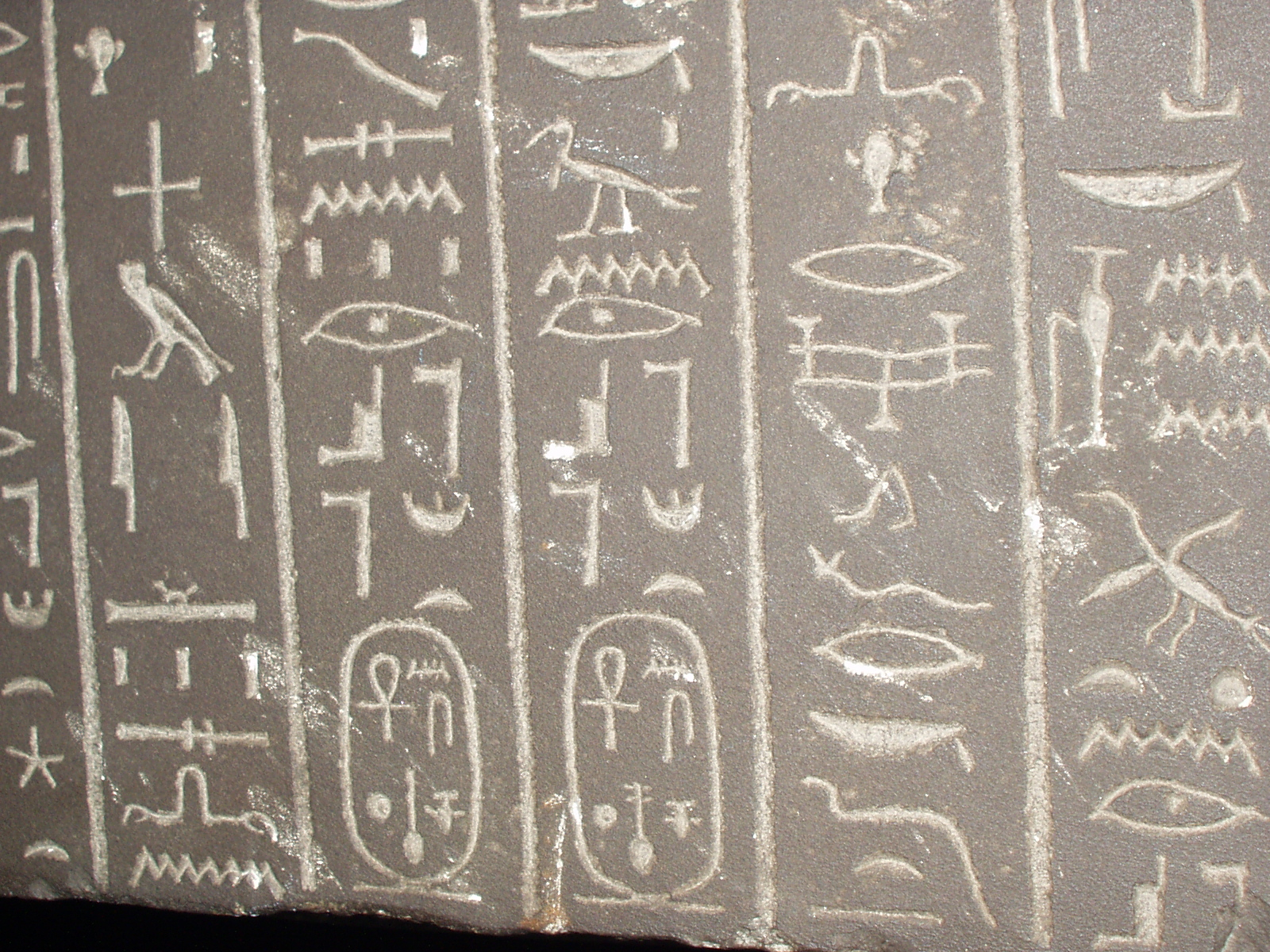 eigen foto Britisch Museum november 2003, gemaakt door Ben Pirard. De tekst gaat over een koninklijke gemalin Ankhnes-Neferibra (zie ook de 3e en 4e regel).